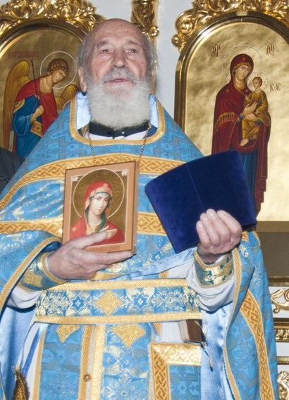 Протоиерей Сергий Гарклавс, хранитель Тихвинской иконы Божией Матери